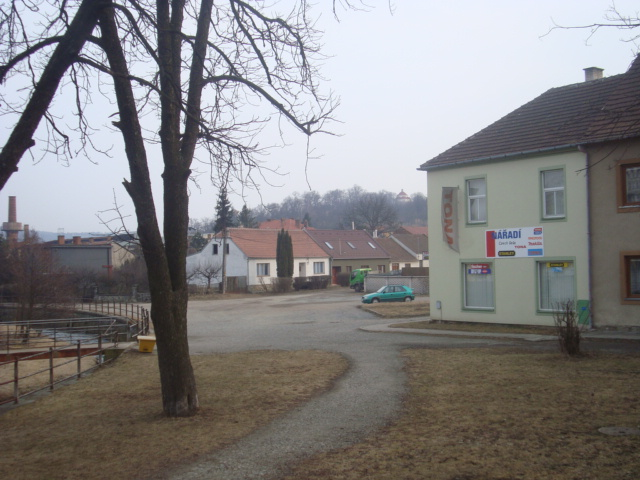 Rosice (Brno-venkov) ulice Nábřeží. Tradiční umístění atrakcí rosické pouti konané při příležitosti svátku Nejsvětější Trojice. (Kaple sv. Trojice mezi stromy u horizontu)